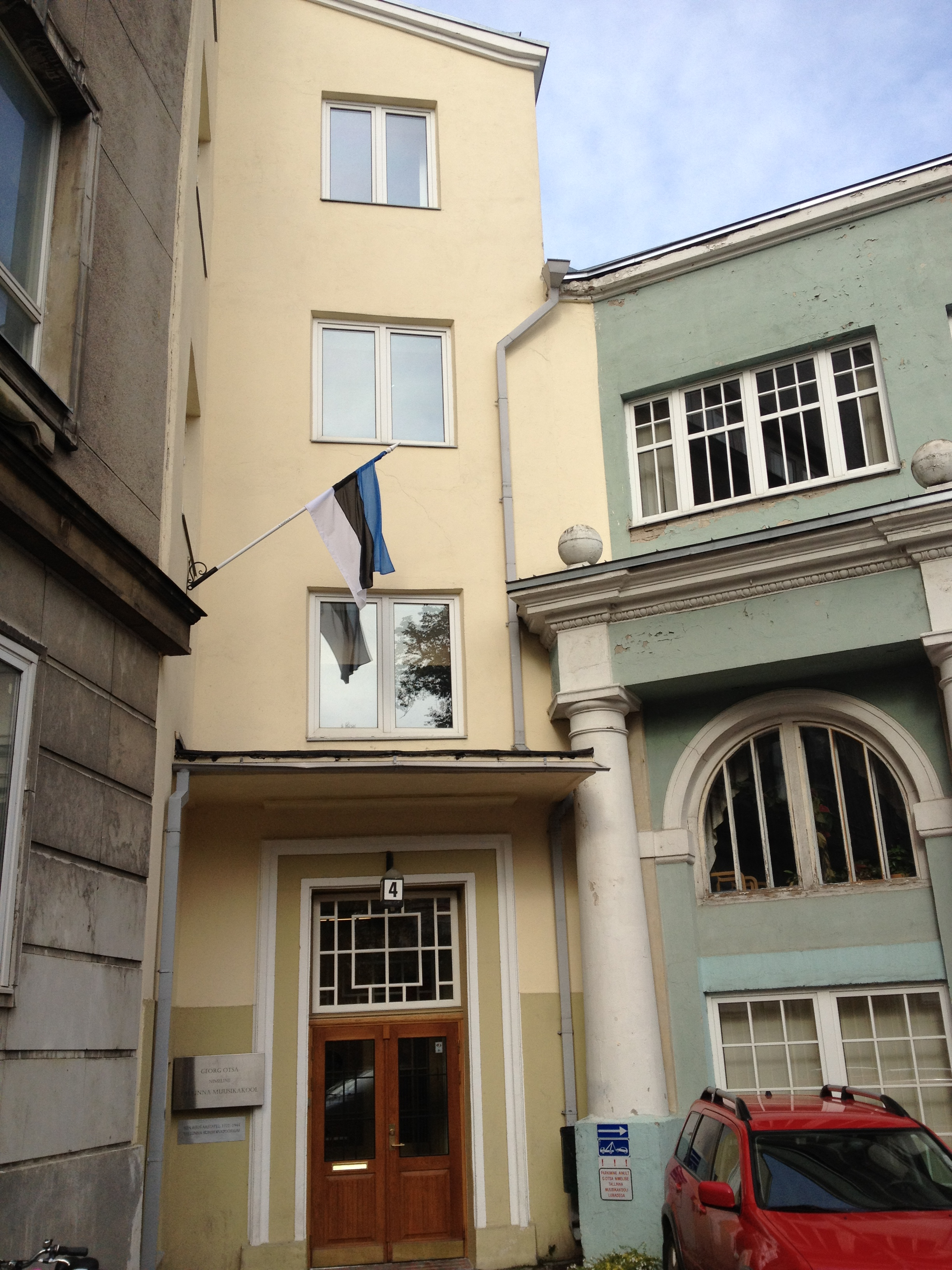 Maja, kus asus Eesti esimene muusikakõrgkool